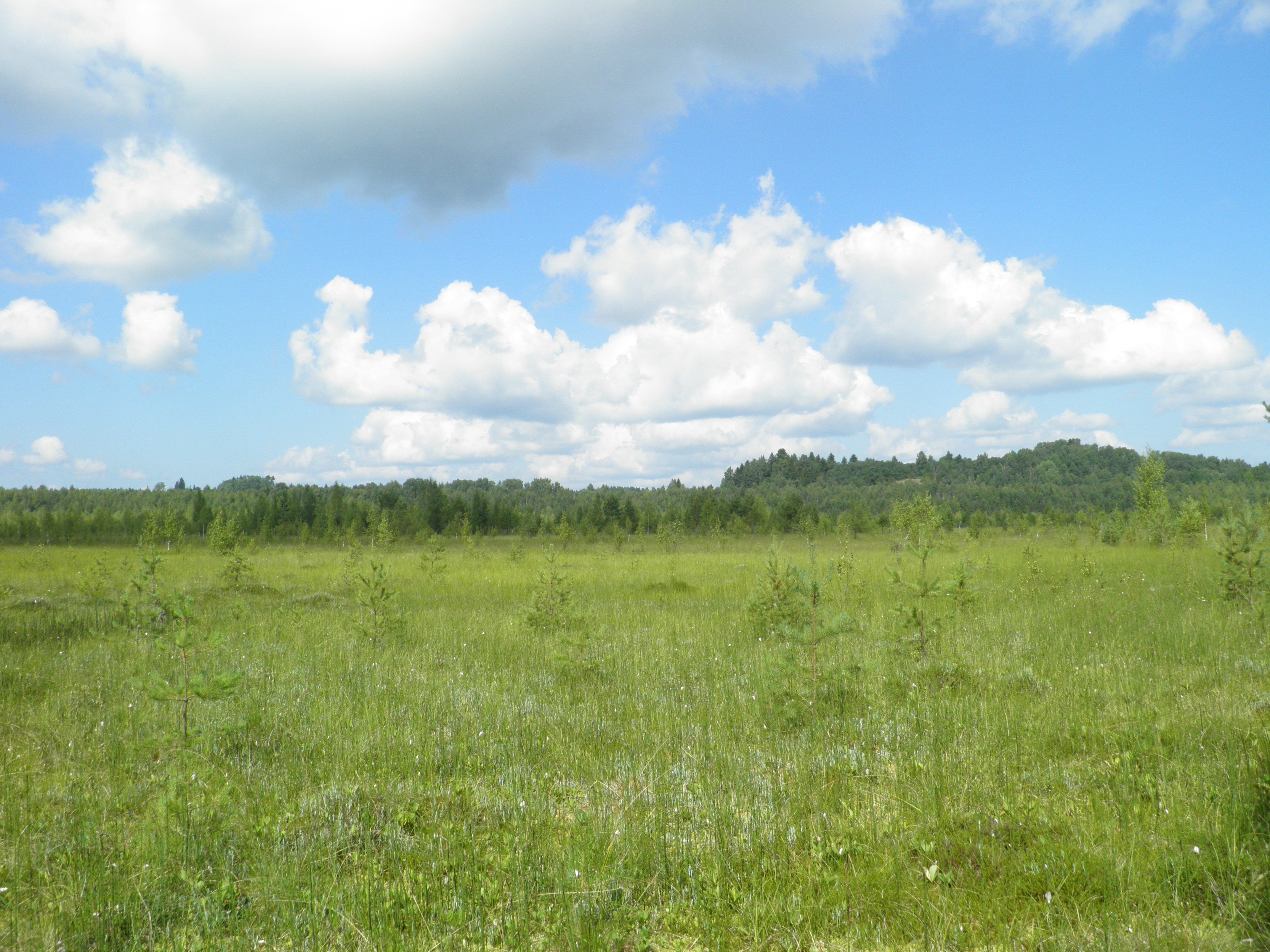 Lamminjärvensuota etelästä nähtynä Hämeenlinnan Lammilla, oikealla taustalla Halilan kallioaluetta.